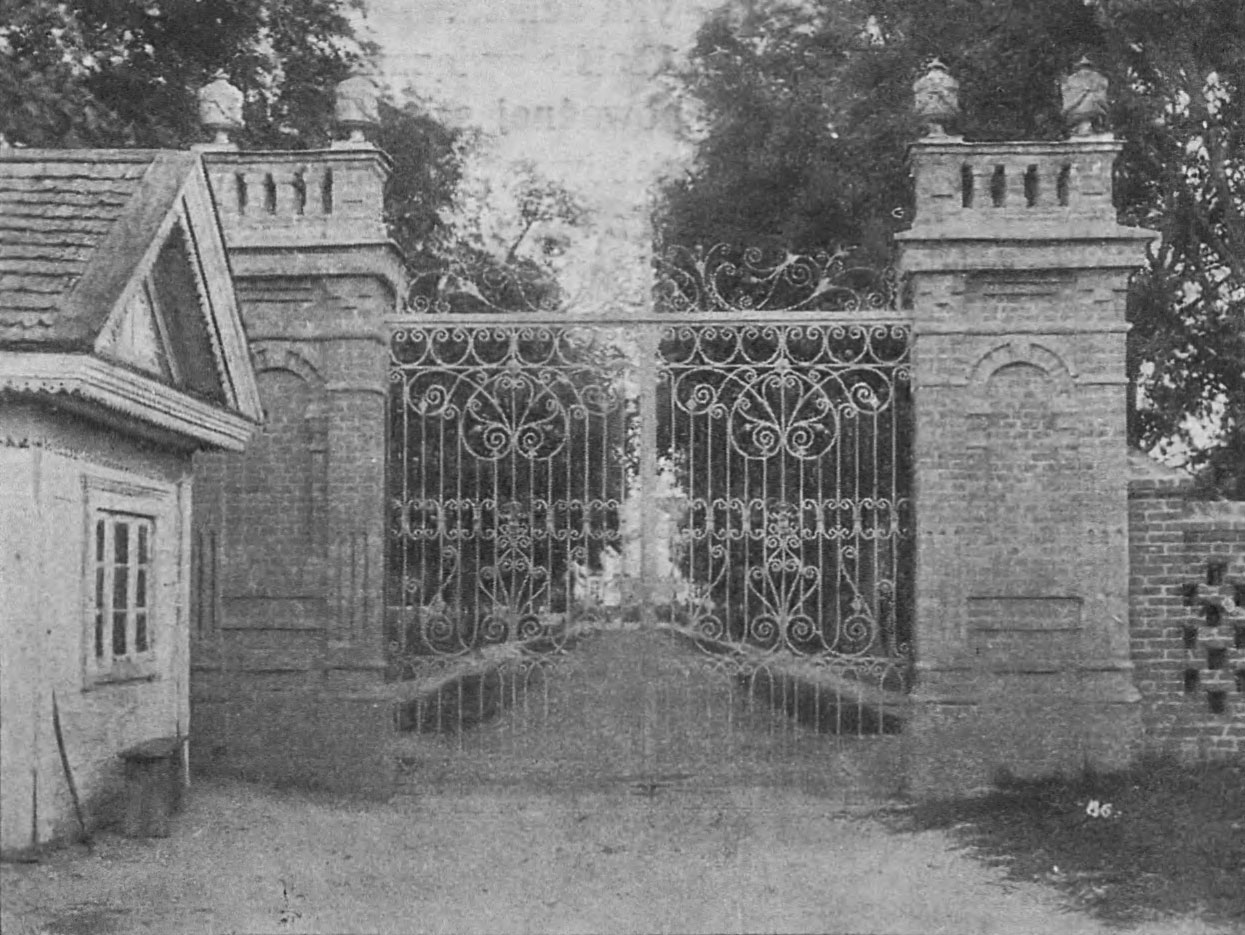 Беларуская (тарашкевіца): Барбароў (Barbaroŭ), сядзіба Горватаў (Horvat)